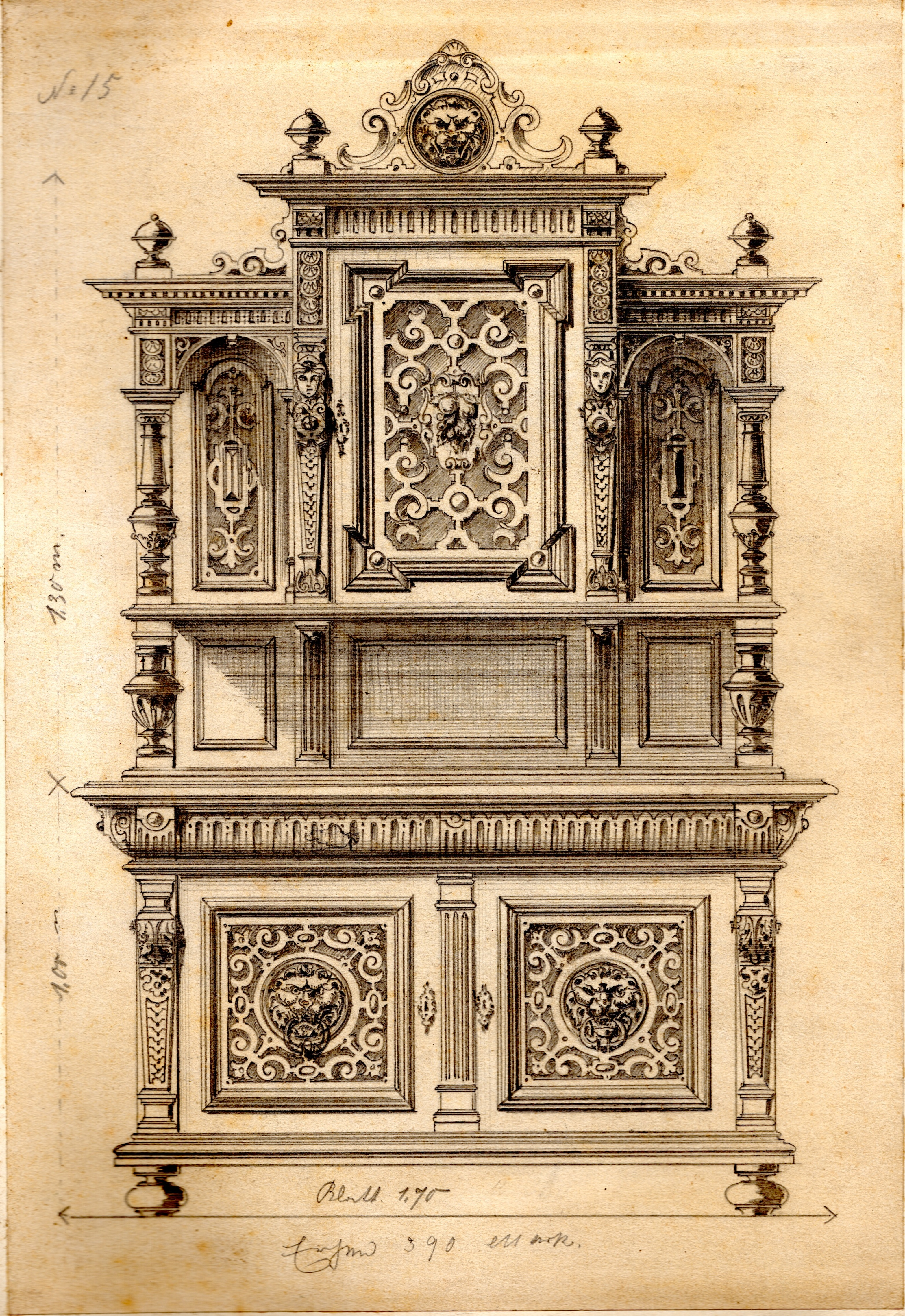 Zeichnung von Büfett im Gründerzeit-Stil aus Angebotsbuch der Firma Anton Spilker „Fabrik geschnitzter Möbel", Steinheim/Westf. ca. 1890